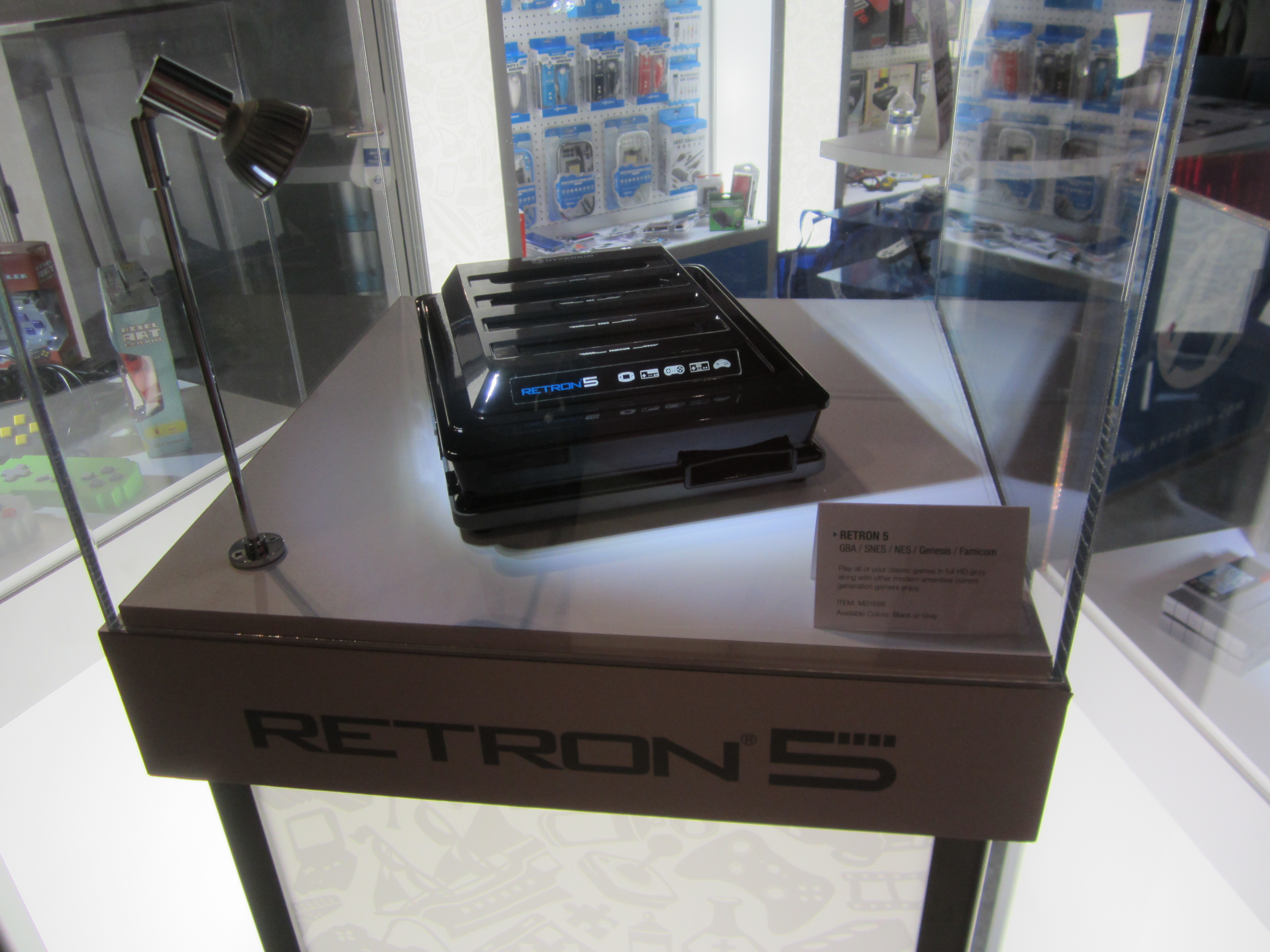 RetroN 5